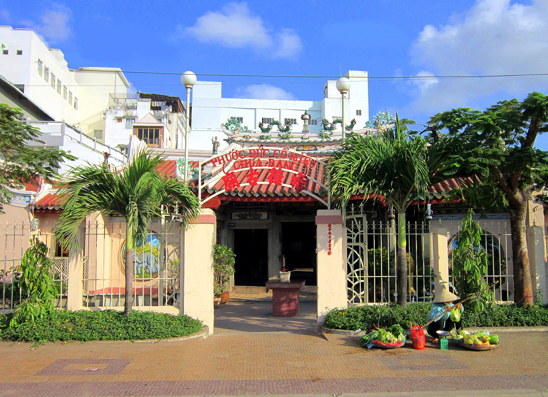 Phước Đức cổ miếu (còn được gọi là chùa Bang); hiện tọa lạc tại số 74 đường Điện Biên Phủ, thuộc phường 3, thành phố Bạc Liêu, tỉnh Bạc Liêu, Việt Nam.